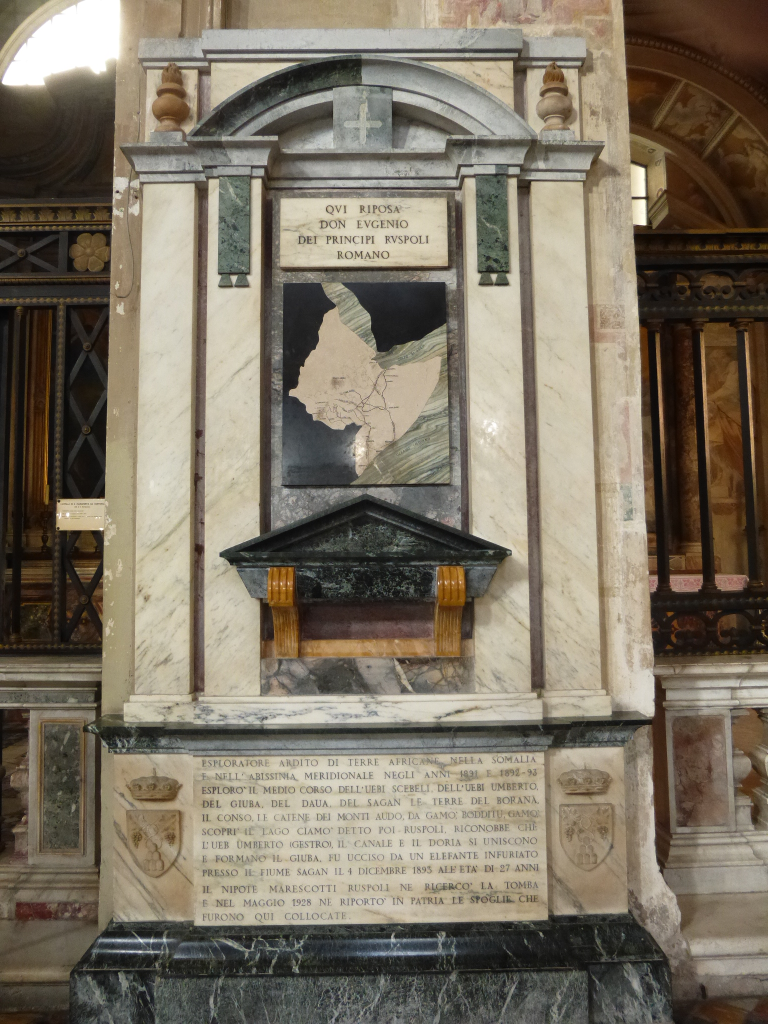 Roma, santa Maria in Aracoeli. Tomba di don Eugenio dei principi Ruspoli, esploratore.